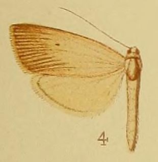 Haimbachia fuscicilia